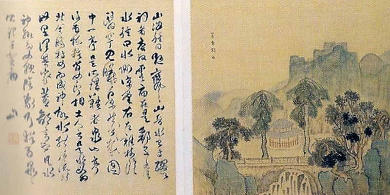 Paysage, extrait d'Album de paysages, feuille d'album, encre et couleur sur soie, dynastie des Qing. 36,5x37cm. Musée du palais impérial, Beijing.